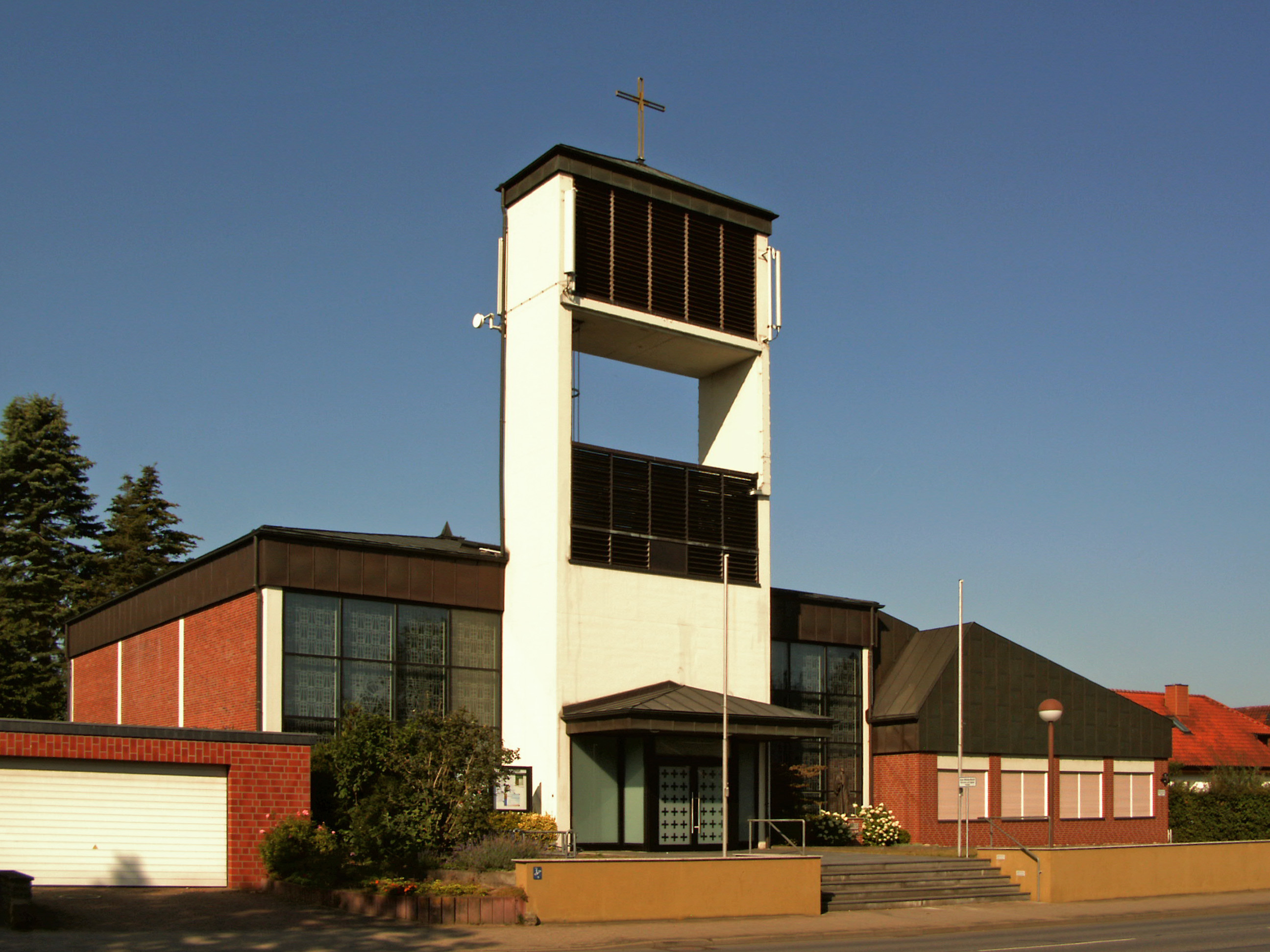 Katholische Kirche St. Josef in Vöhrum, Ortsteil von Peine